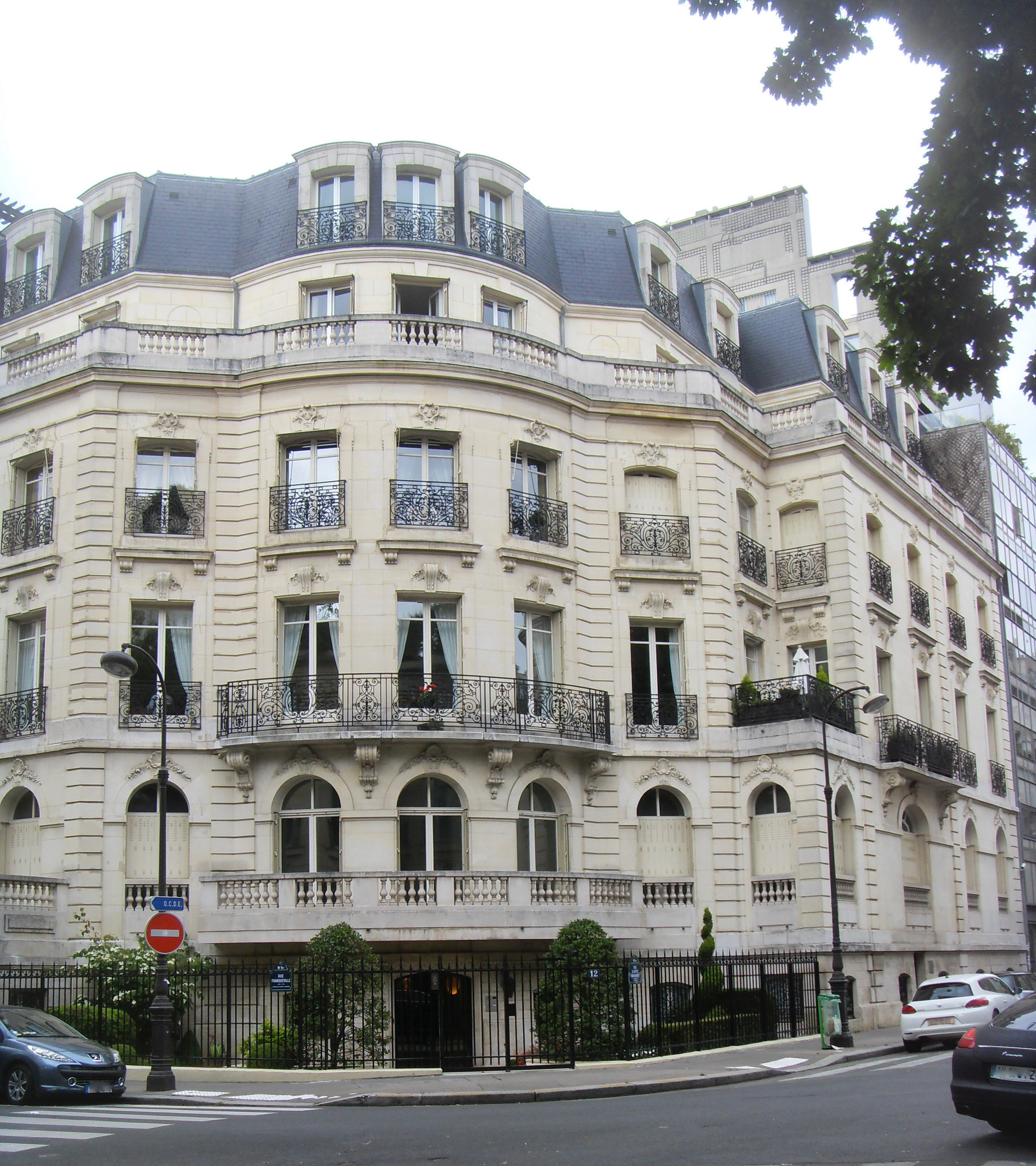 Rue Alberic-Magnard (Paris) - hôtel Deutsch de la Meurthe